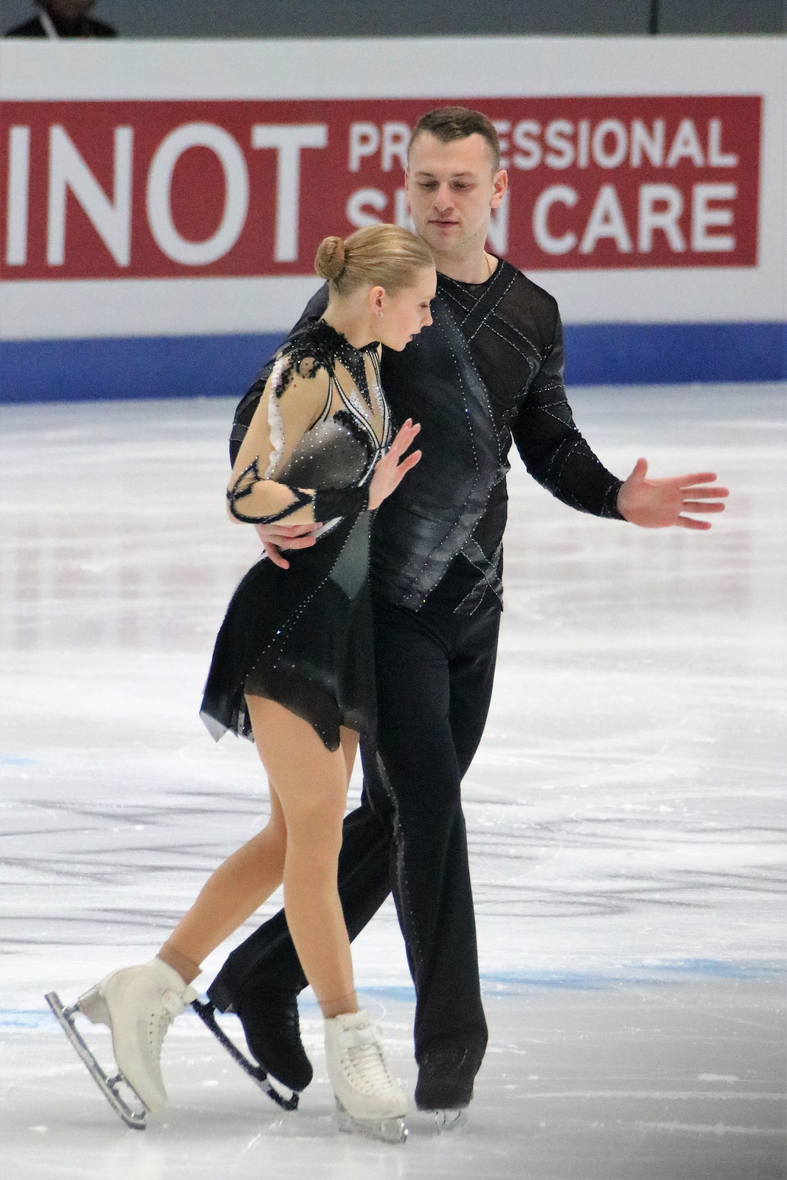 Анна Верников и Евгений Краснопольский (Израиль) на чемпионате Европы по фигурному катанию 2020